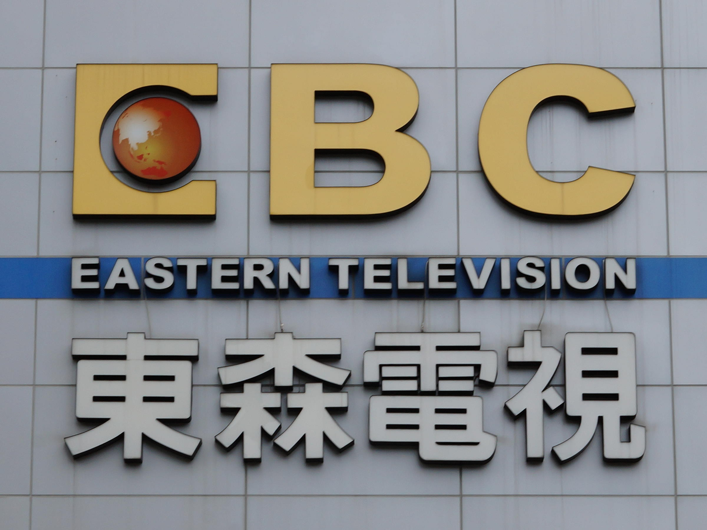 東森新聞雲南港辦公室與東森電視南港攝影棚正面外牆，東森電視商標。